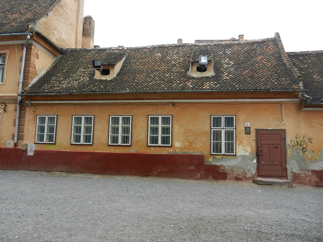 Casa paraclisierului